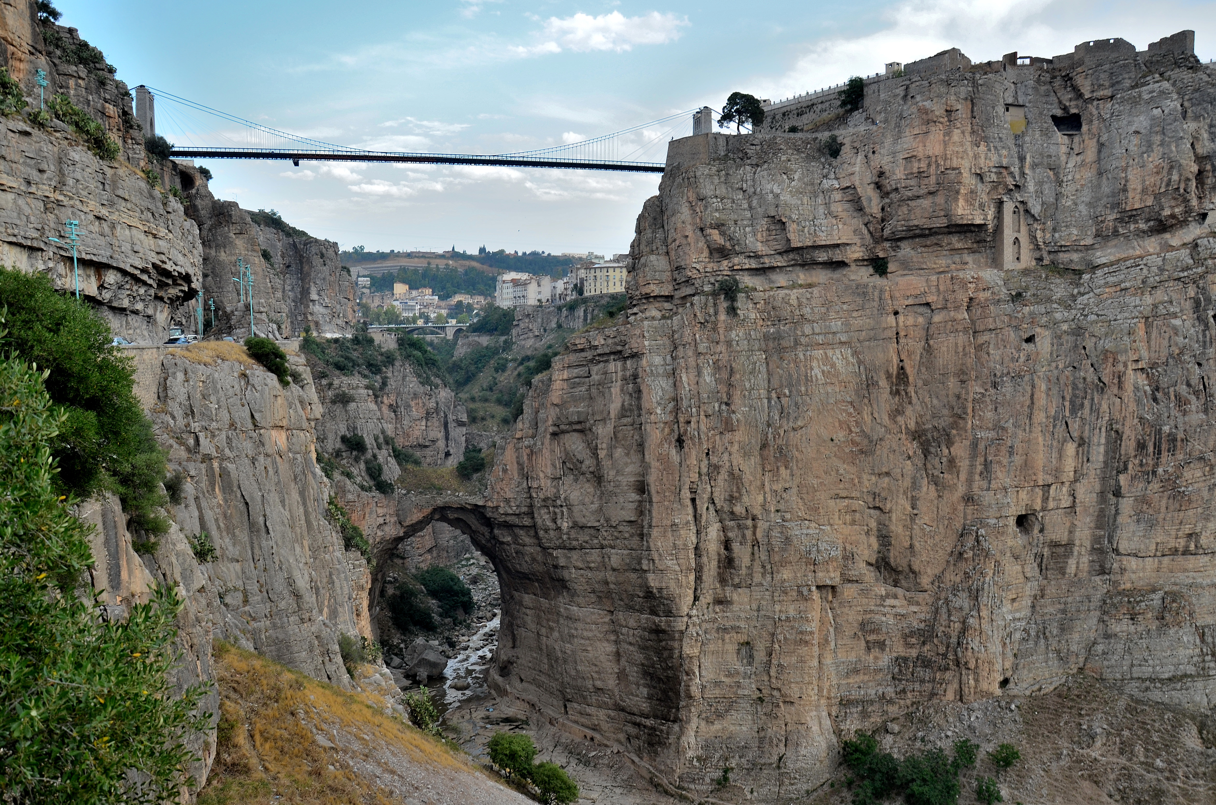 Constantine,les gorges du Rhummel, vue sur la grande arche & le pont suspendu